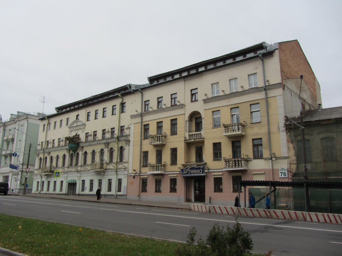 Мінск. Плошча Мяснікова. Забудова вул. Мяснікова